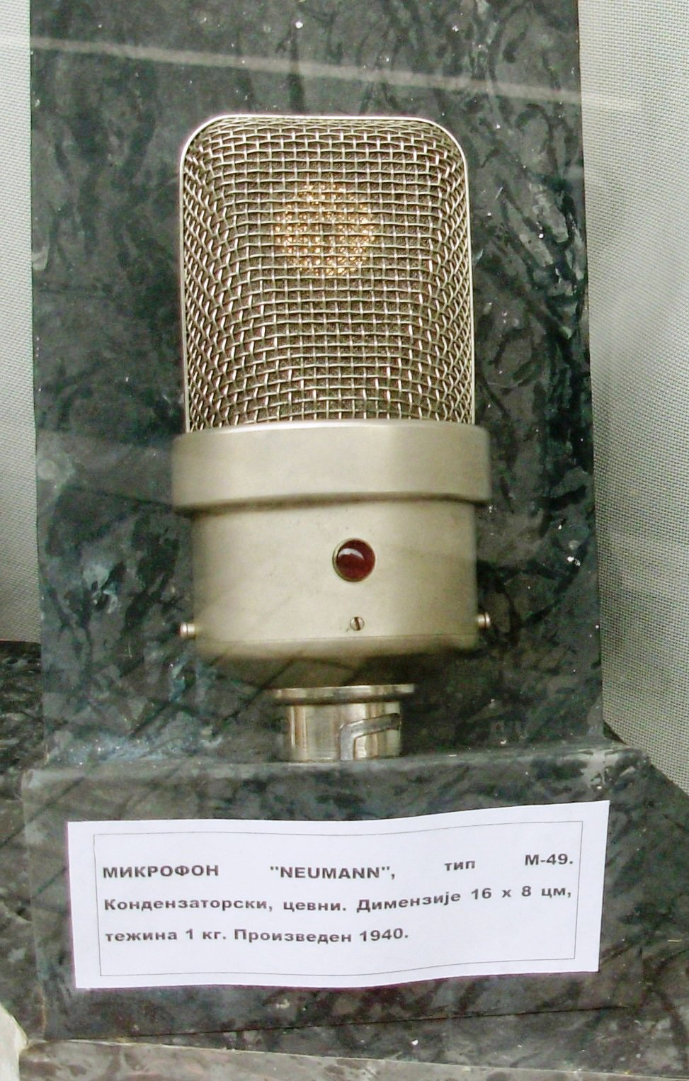 Mikrofon koji je bio u upotrebi u Radio Beogradu. Slikao Goldfinger Neumann M-49 (1940)